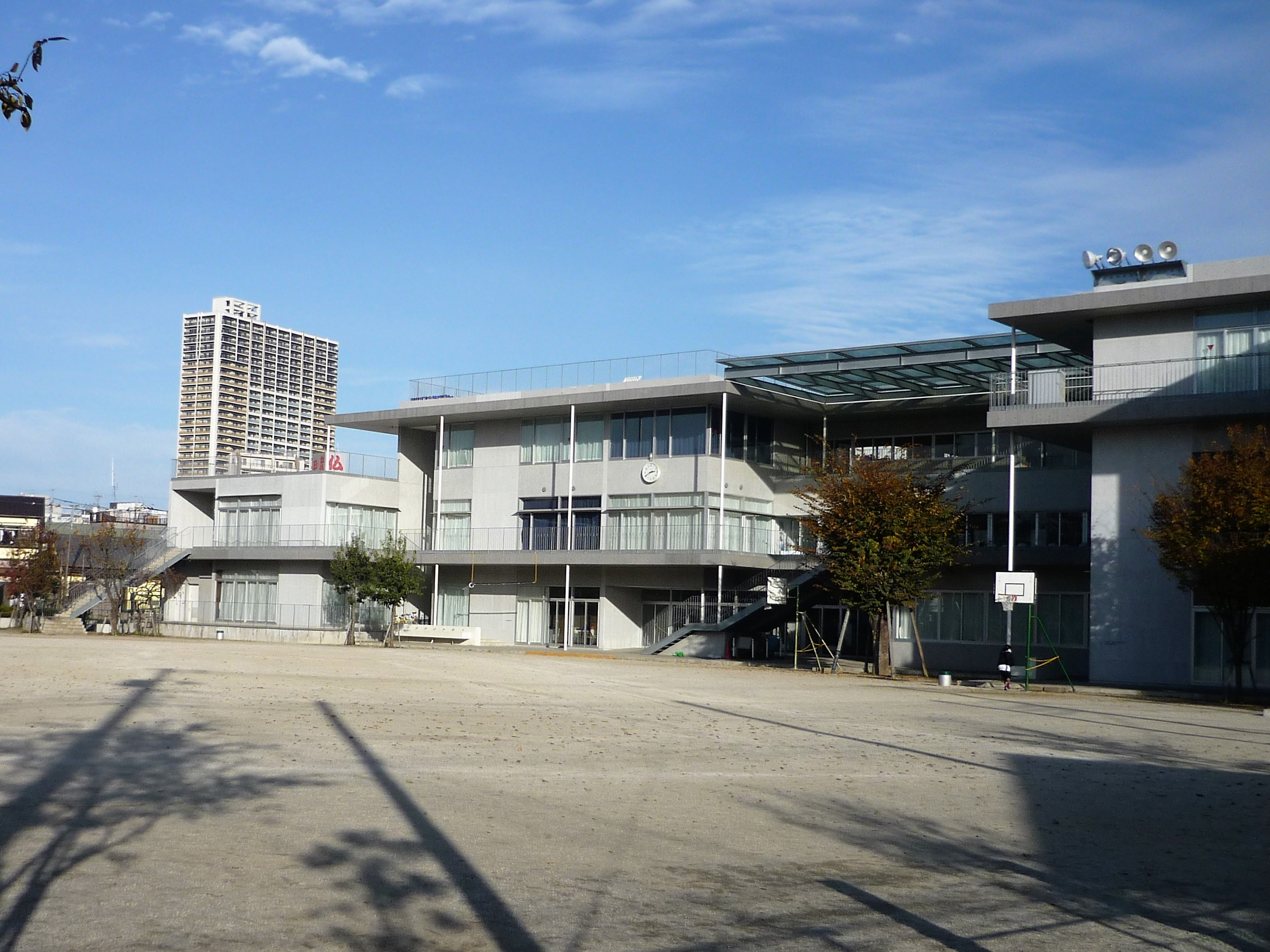 立川市立第一小学校校庭